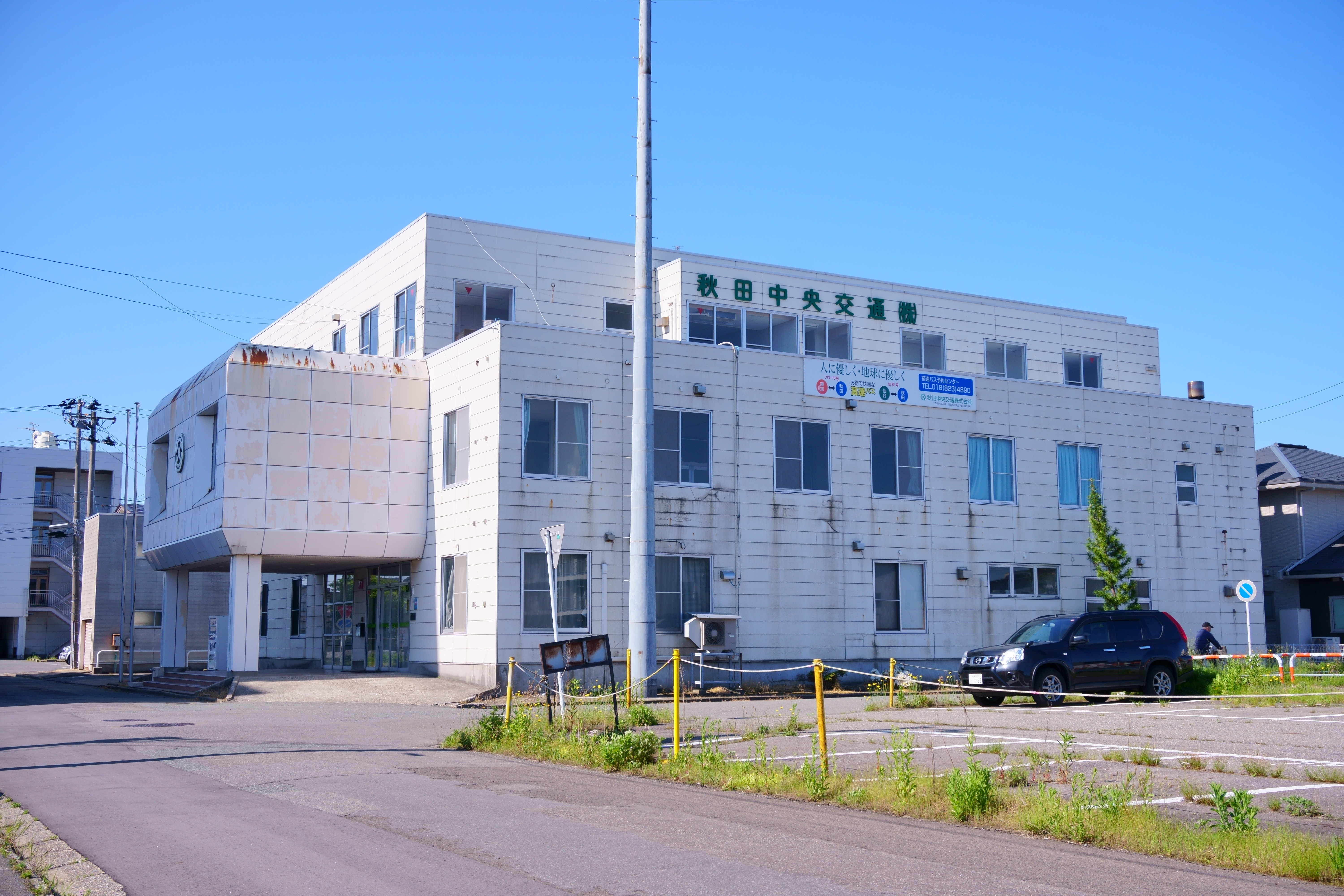 秋田中央交通本社（秋田市川元山下町）